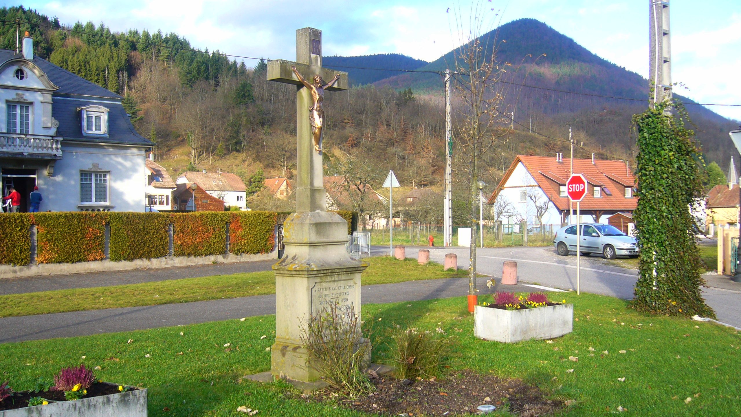 Lièpvre A 005.JPG